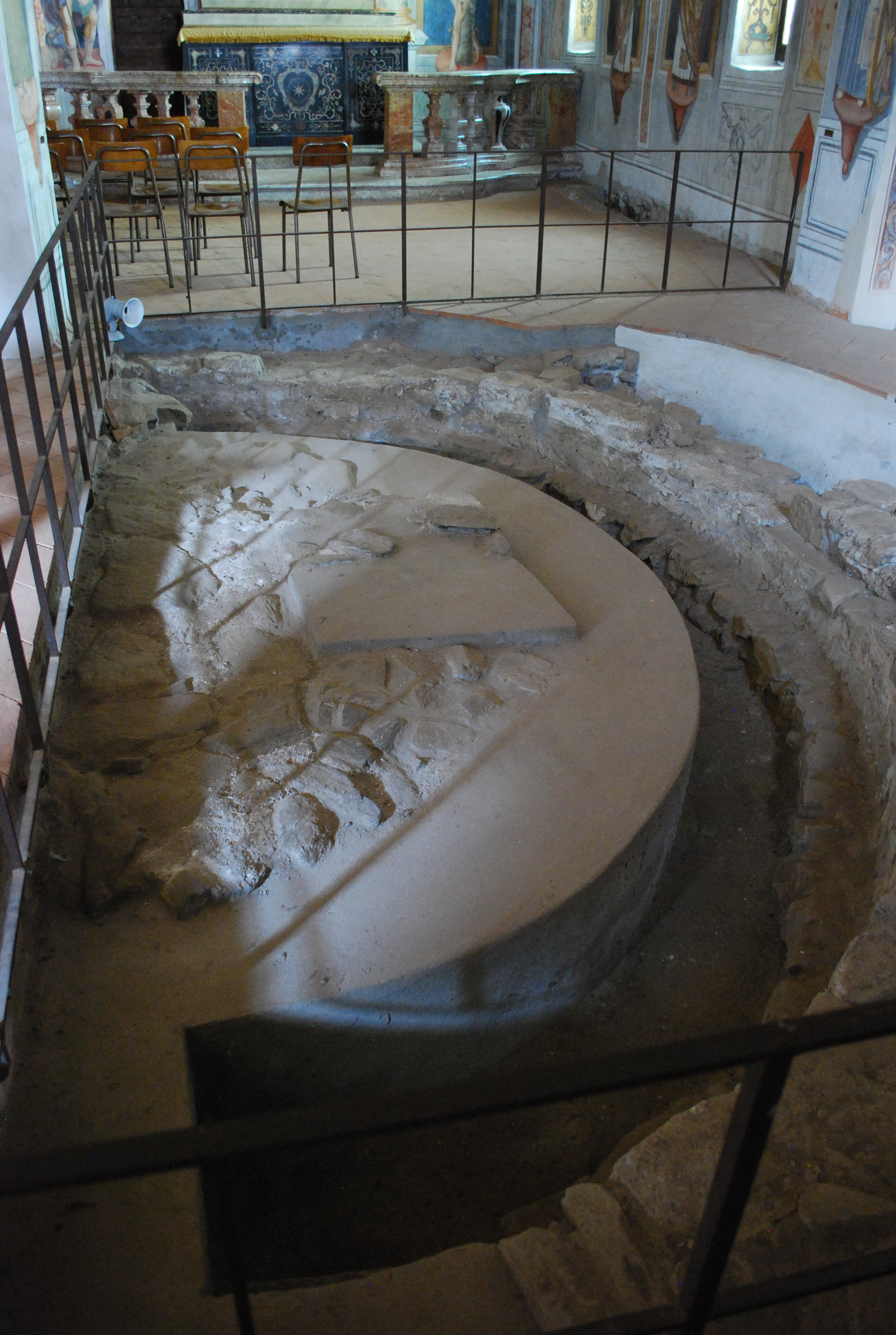 Chiesa vecchia di Santa Maria a Belgirate, vista degli scavi